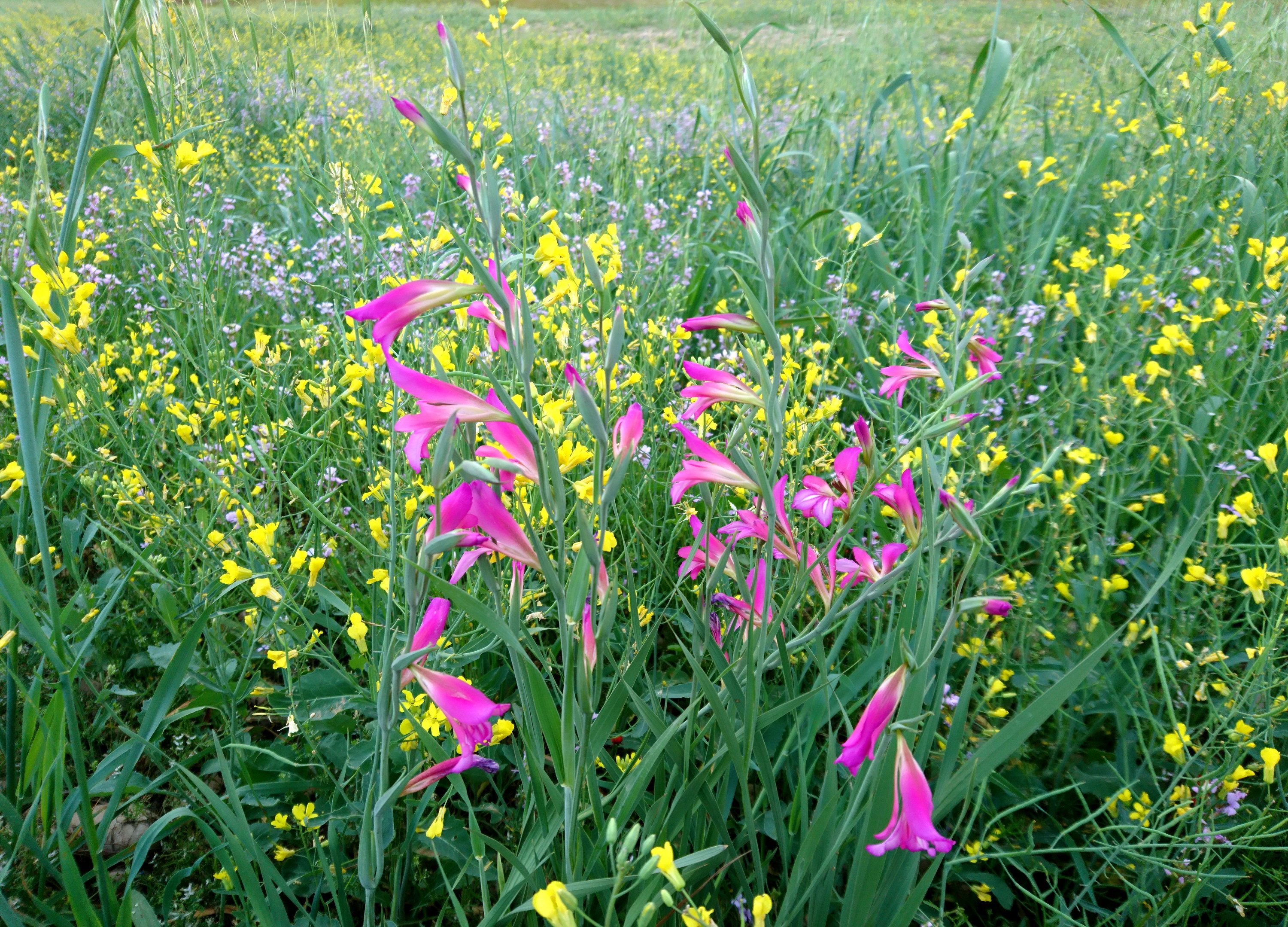 گلایول شمشیری خودرو، فروردین‌ماه بهبهان